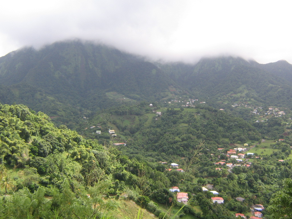 le Morne-Vert (Martinique) et les pitons du Carbet dans la brume.